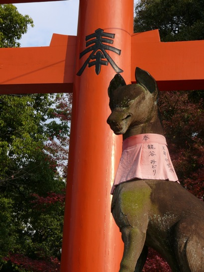 Renard sacré, messager du dieu Inari.